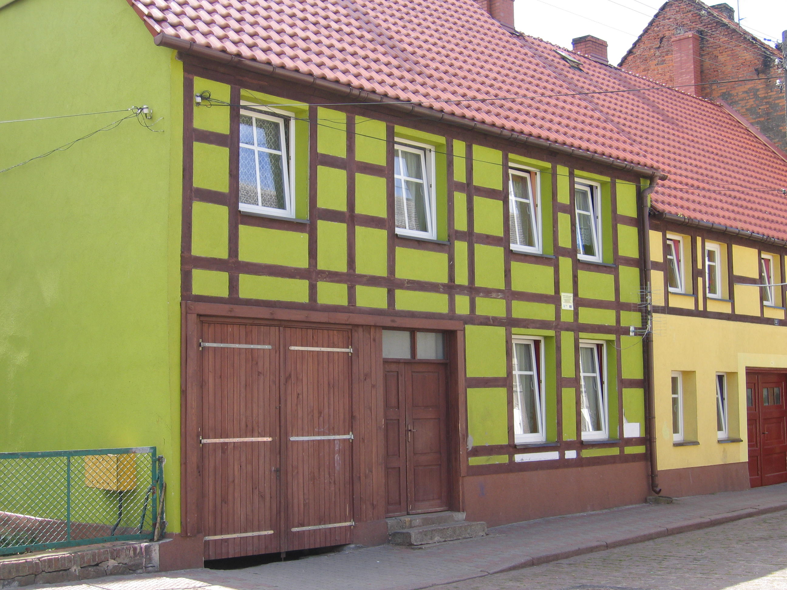 budynek mieszkalny Mieszkowice ul. Sienkiewicza 54, Mieszkowice